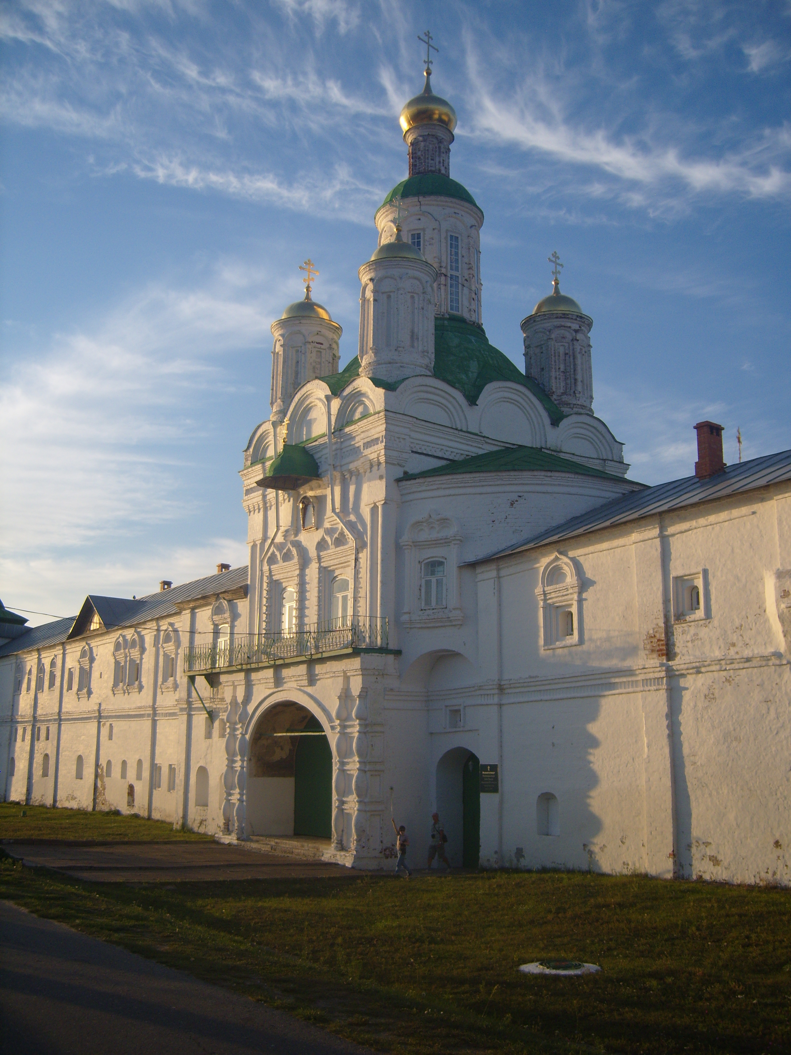 церковь Михаила Архангела (надвратная церковь): Макарьево, Лысковский район, Нижегородская область